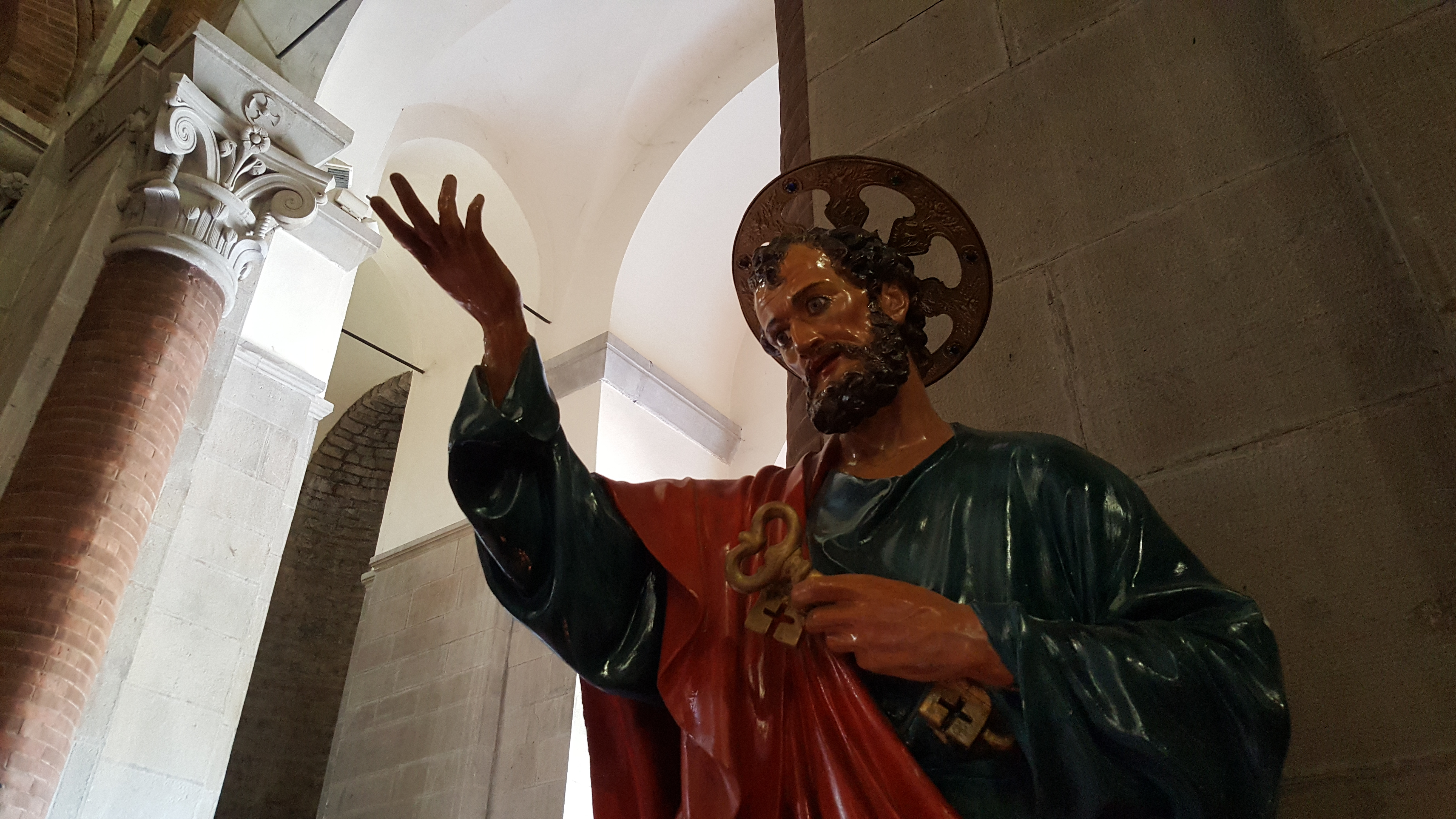 San Pietro This is a photo of a monument which is part of cultural heritage of Italy.